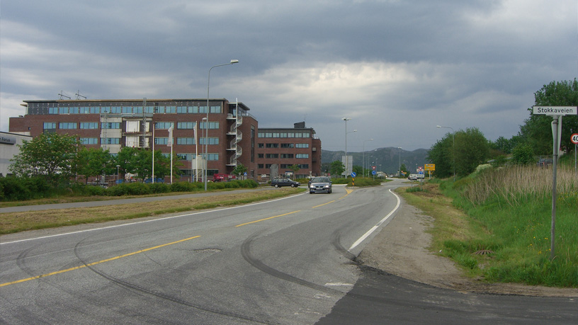 Løwenstrasse in Sandnes, Norway